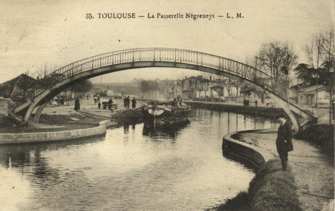 France, Haute-Garonne (31), Toulouse, quartier des Minimes et canal du Midi, vieille carte postale